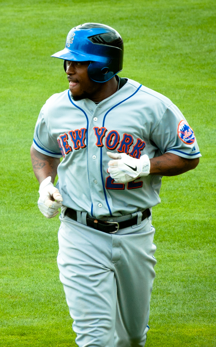 Willie Harris